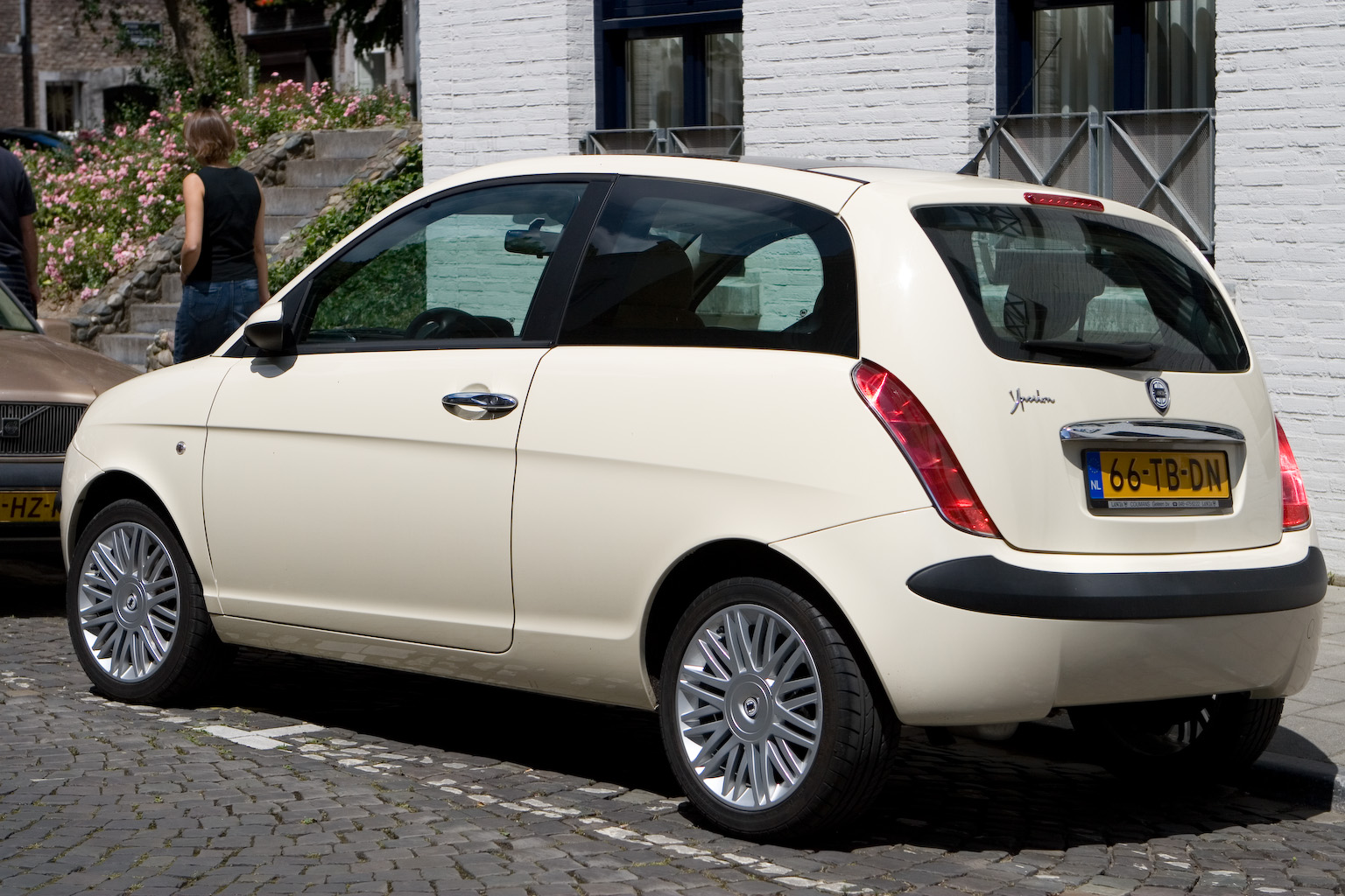 Lancia Ypsilon nei Paesi Bassi